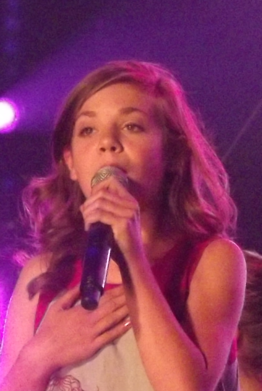 Laura Omloop tijdens de uitreiking van de Radio 2 Zomerhit-award op 17 augustus 2012 in Middelkerke-Westende